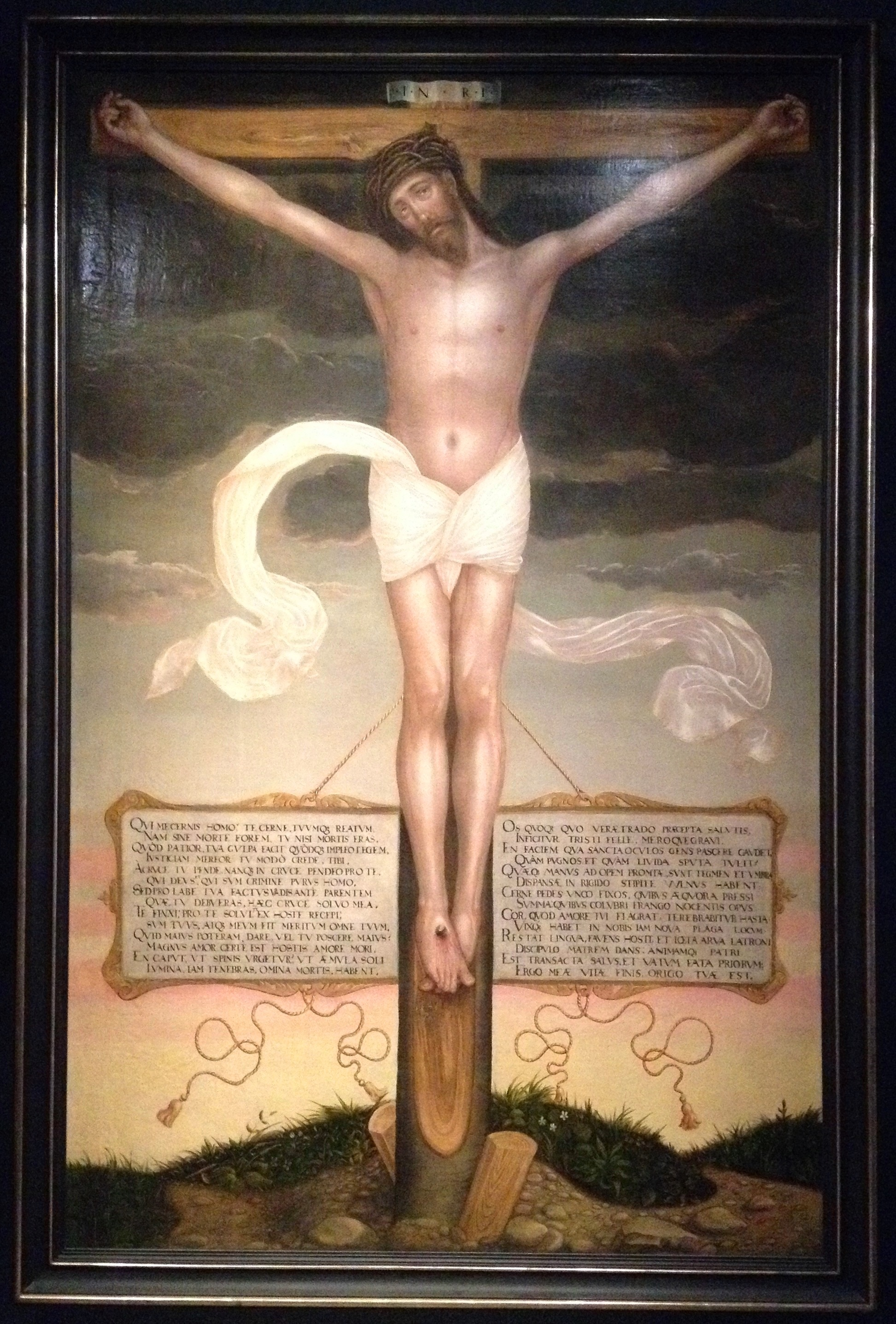 Lukas Cranach d. J: Christus am Kreuz (1571; 250 x 156 cm; Information auf ). Das Bild hängt am Aufgang zu den Ausstellungsräumen im Lutherhaus Wittenberg. Es zeigt Christus lebend am Kreuz, den Blick auf den Betrachter gerichtet. In den lateinischen Versen spricht er den Betrachter an und deutet sein Leiden und Sterben als Versöhnungsopfer für dessen Sünden. Der Text stammt von Johann Major (1533-1600), veröffentlicht in seinen Elegiae 1584 (Digitalisat).